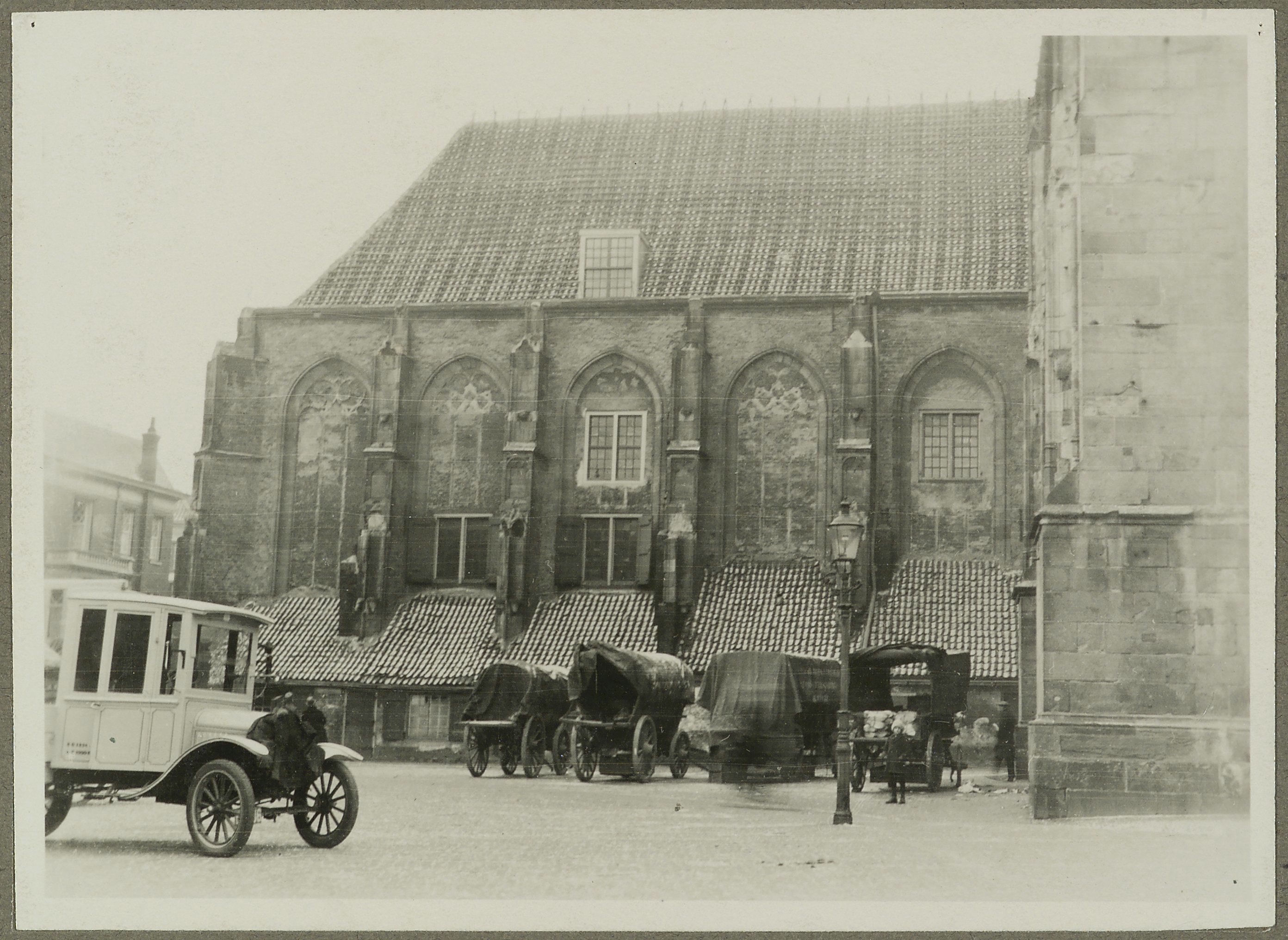 Mariakerk: Zuidgevel met aangebouwde huizen (opmerking: Auto op de voorgrond)